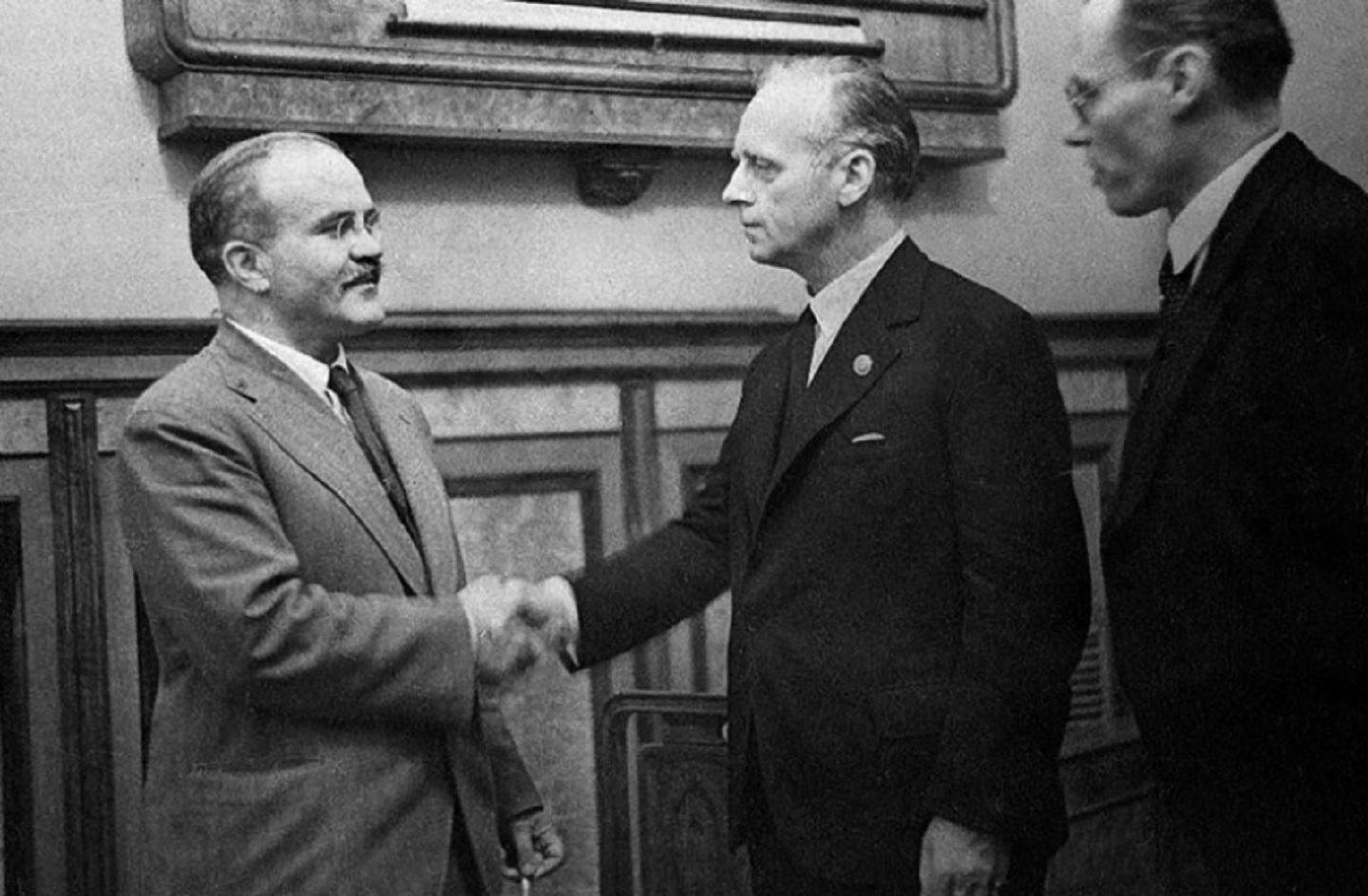 Нарком иностранных дел СССР В. М. Молотов (слева) и Министр иностранных дел Германии Иоахим фон Риббентроп обмениваются рукопожатием после подписания договора о дружбе и границе между СССР и Германией